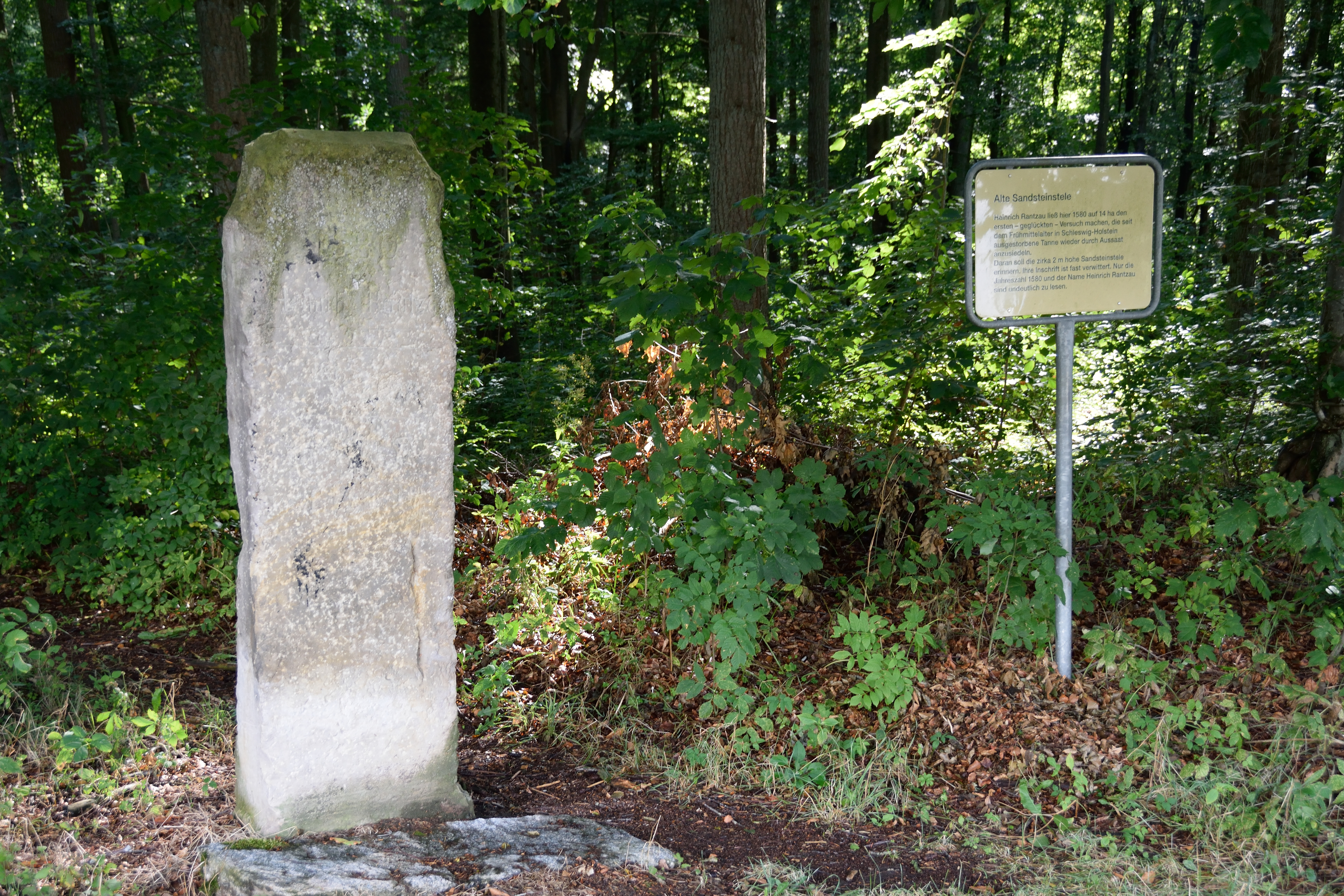 Gedenkstele für die Wiederansiedelung der Tanne in Schleswig-Holstein durch Heinrich Rantzau. Die aus Sandstein gefertigte Stele steht an der Kreisstrasse 45 an der Grenze von Schlotfeld und Oelixdorf in der Nähe von Winseldorf. Augrund der Verwitterung ist ausser dem Namen und der Jahreszahl ist keine weitere Inschrift mehr erkennbar.